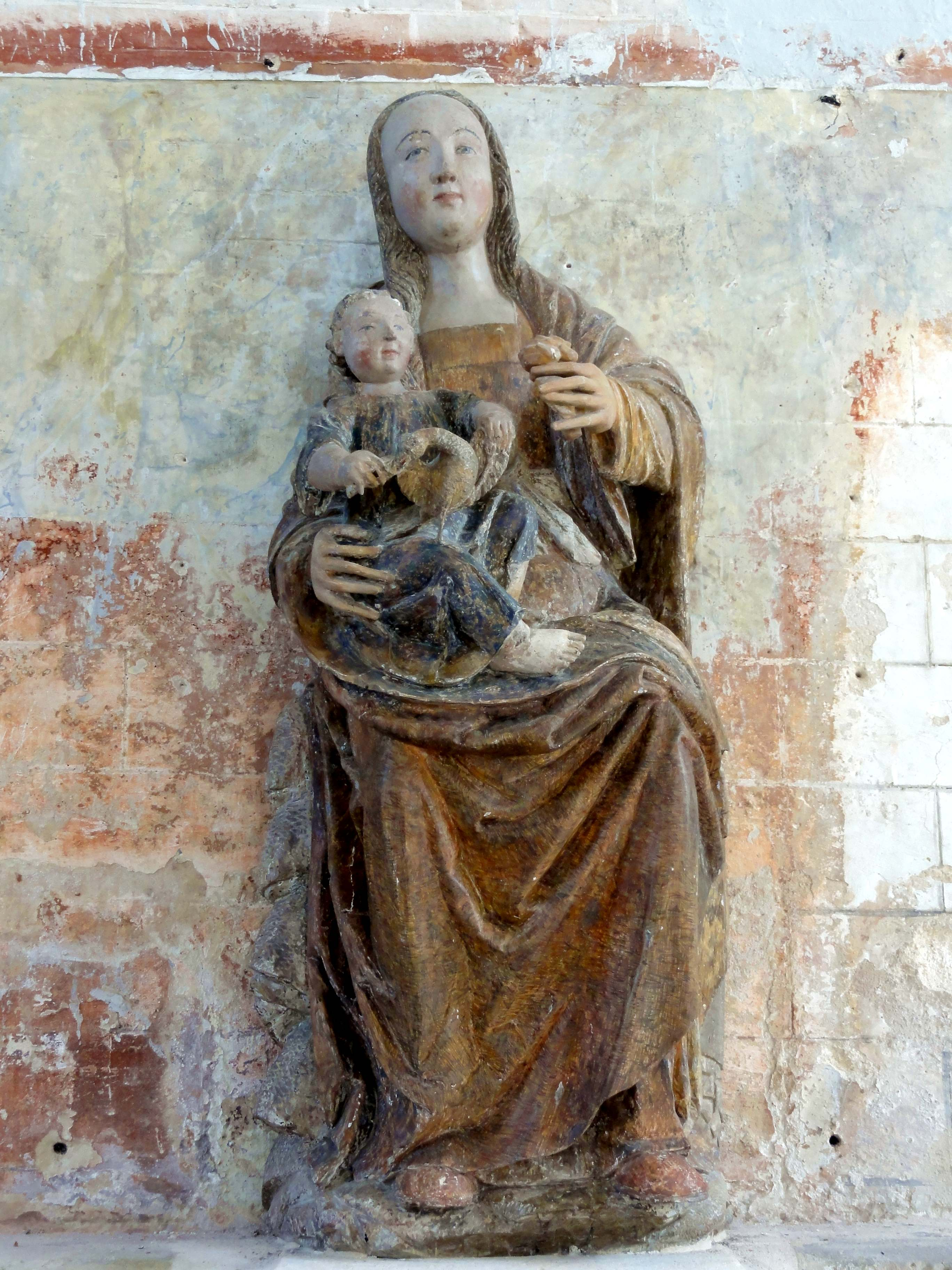 Vierge à l'Enfant assise du XVIe siècle.